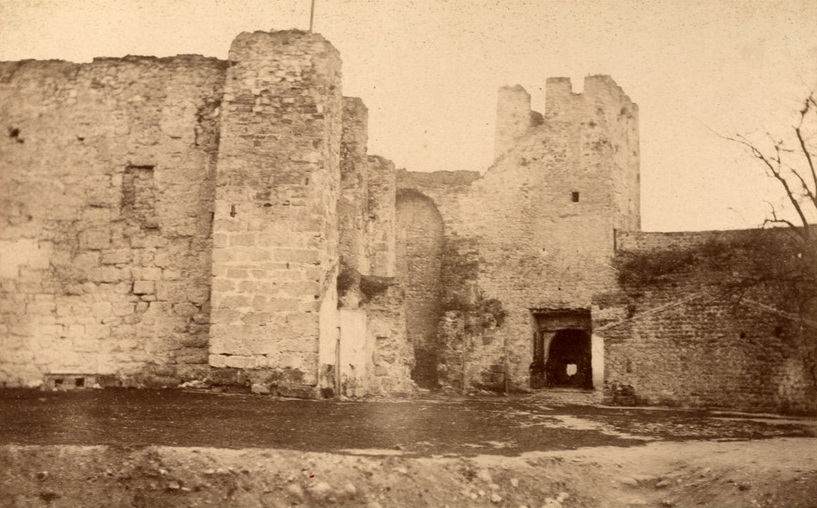 Samsun Kalesi'nin tek fotoğrafı. İstanbul Üniversitesi Kütüphane ve Dokümantasyon Daire Başkanlığı'nın arşivinde "Samsun Kalesi 90764/10" numarasıyla kayıtlıdır.